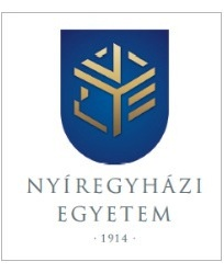 University of Nyiregyhaza